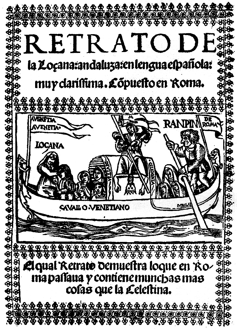 Francisco Delicado, Retrato de la Loçana andaluza, Venecia, 1528. Página del título.1ª edición, ejemplar único